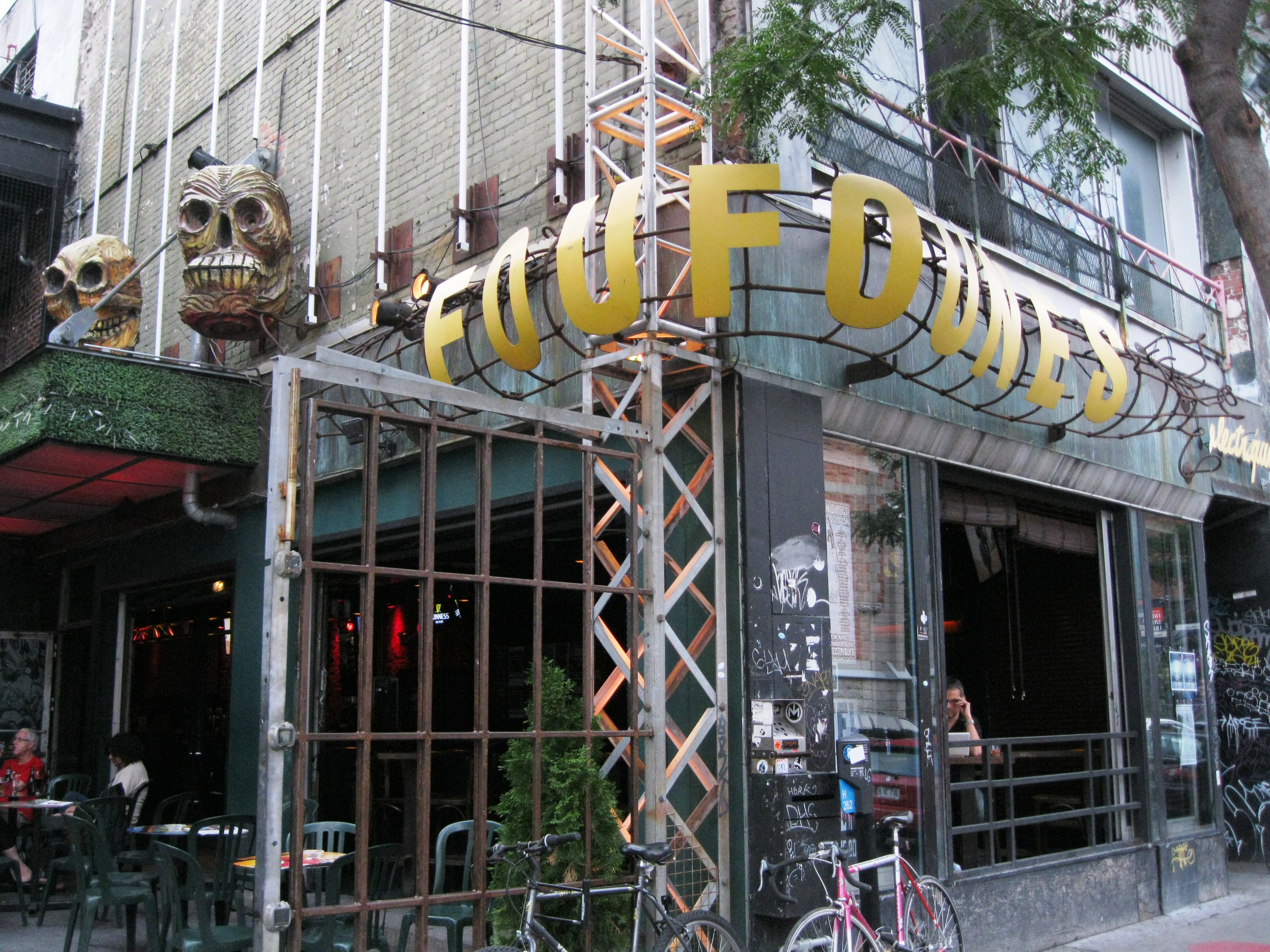 Les Foufounes électriques sont situées rue Sainte-Catherine à Montréal